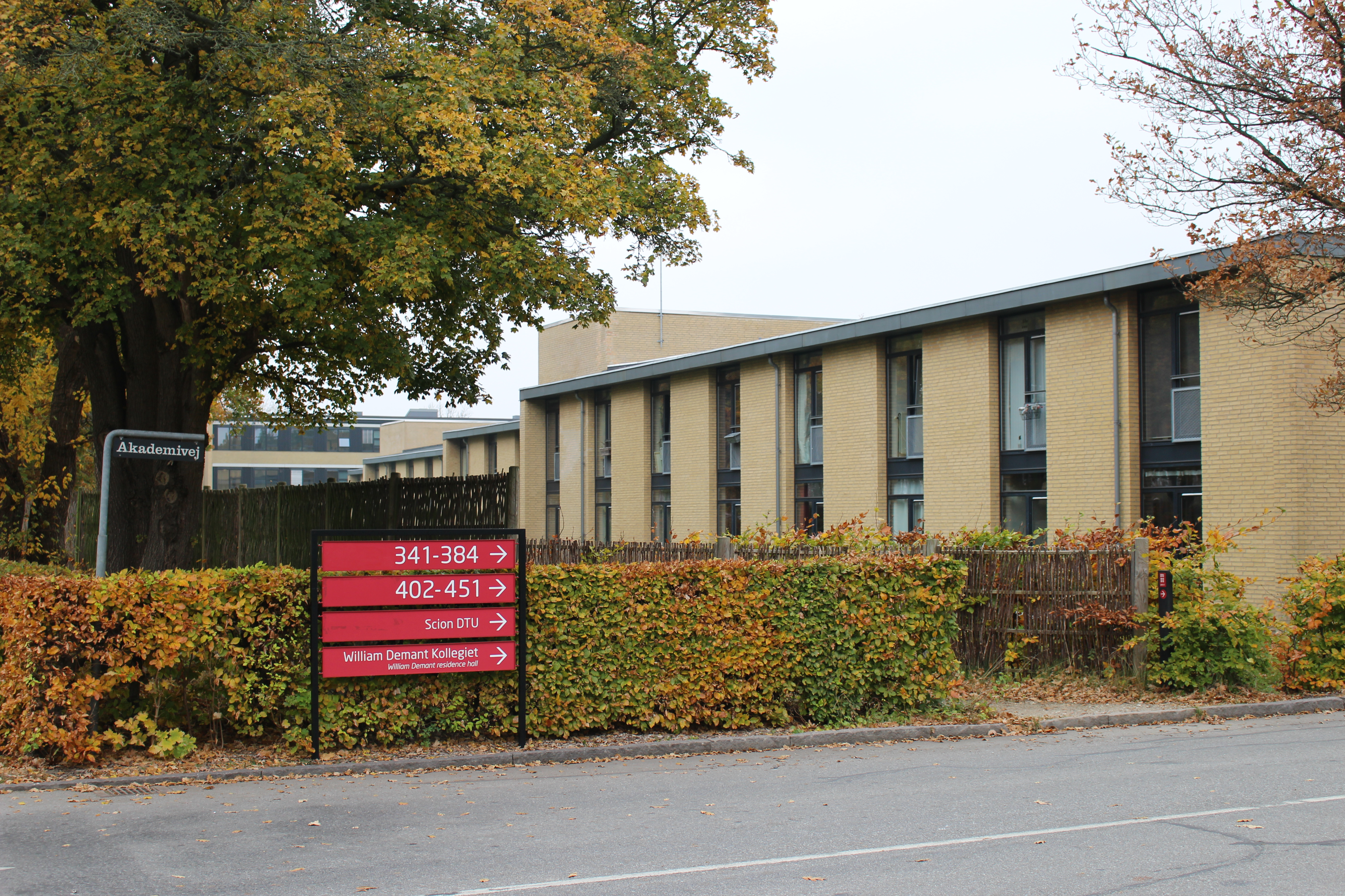 William Demant Kollegiet ved Danmarks Tekniske Universitet